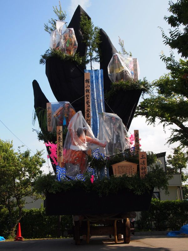 土崎神明社例祭（鎮座400年記念=2013年）で披露された「復元曳山」